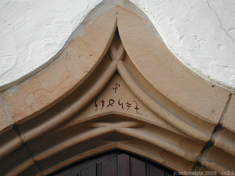 Evangelische Lambertuskirche in Pfaffenhofen (Württ.), Südportal, datiert 1453